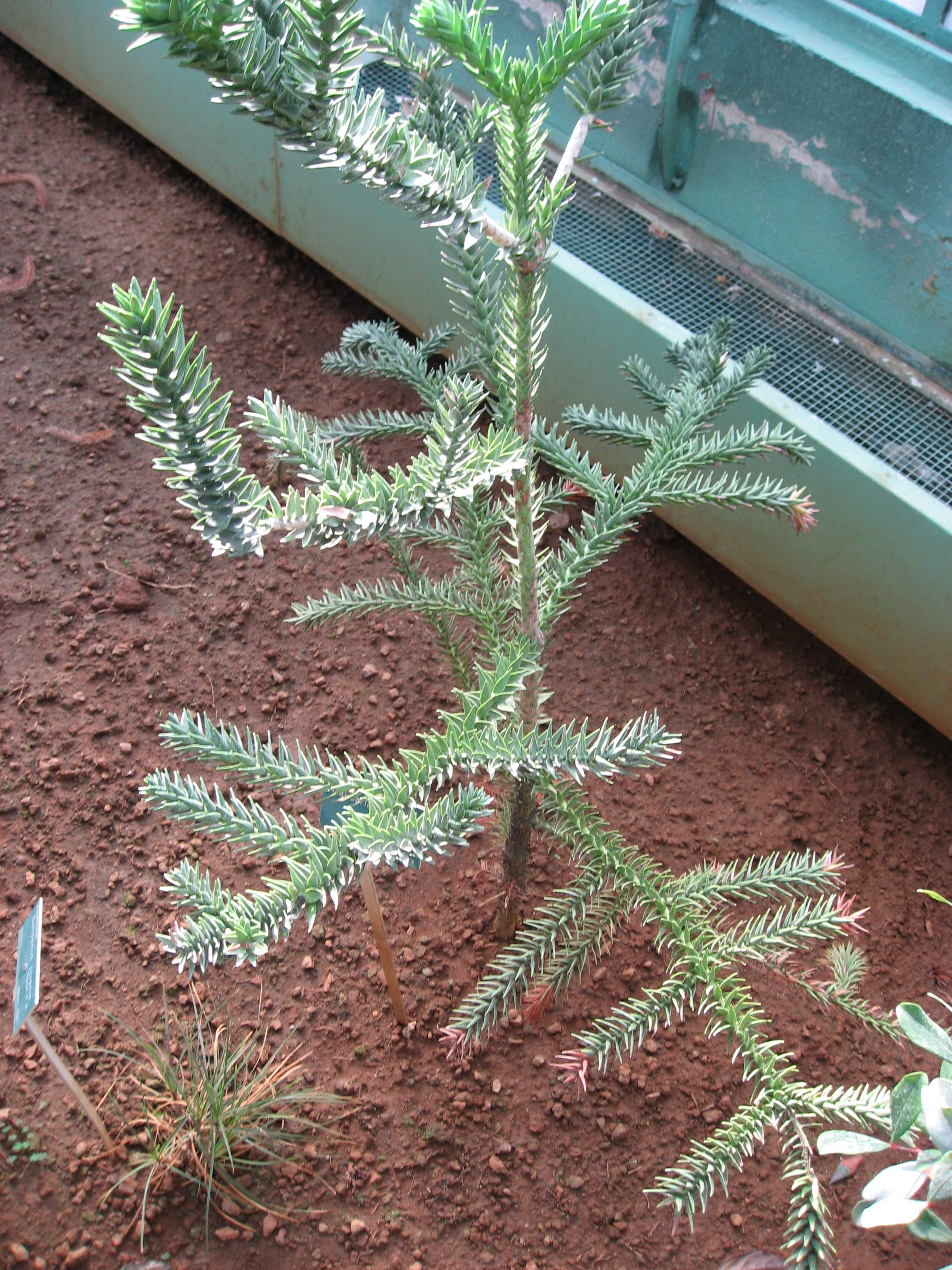 Araucaria montana in Serres d'Auteuil Map: 48° 50' 49" N 2° 15' 8" E